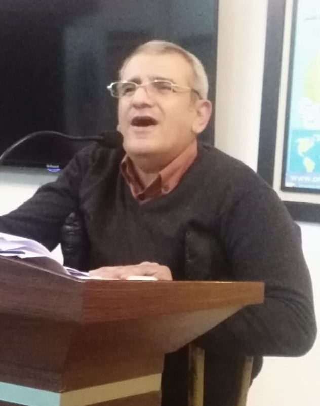 صورة فوتوغرافية للشاعر والروائي علي طه النوباني أثناء أمسية شعرية في رابطة الكتاب الأردنيين في العاصمة الأردنية عمان